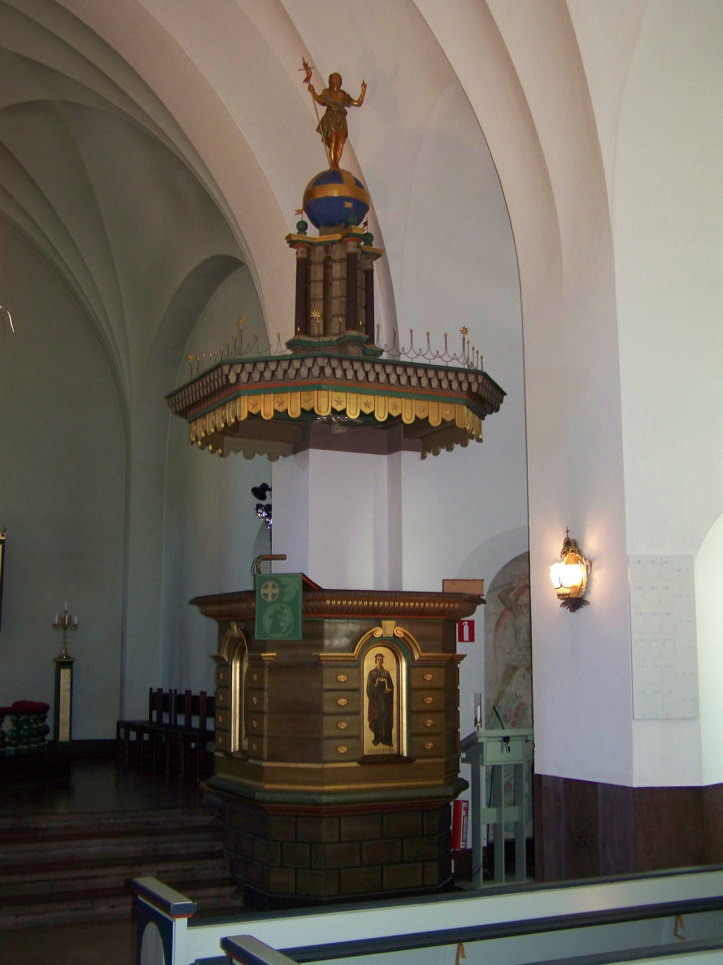 In Kallinge, Schweden. Kirche in Älmhult.